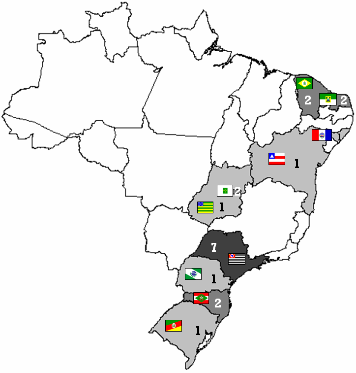 mapa com os times que disputam a Série B do Campeonato Brasileiro de 2008.